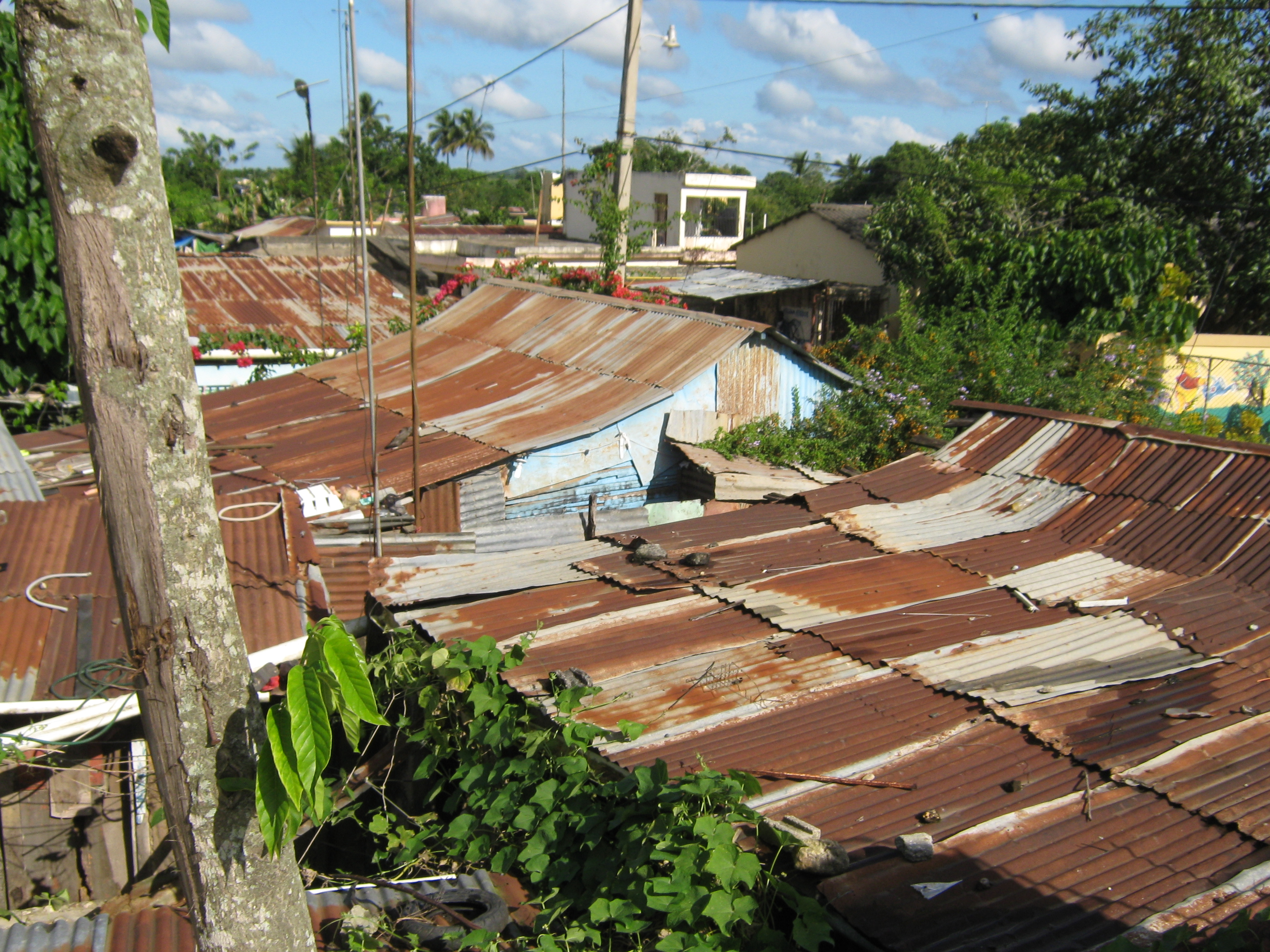 Sabana Grande de Boya, Monte Plata, Dominikanische Republik